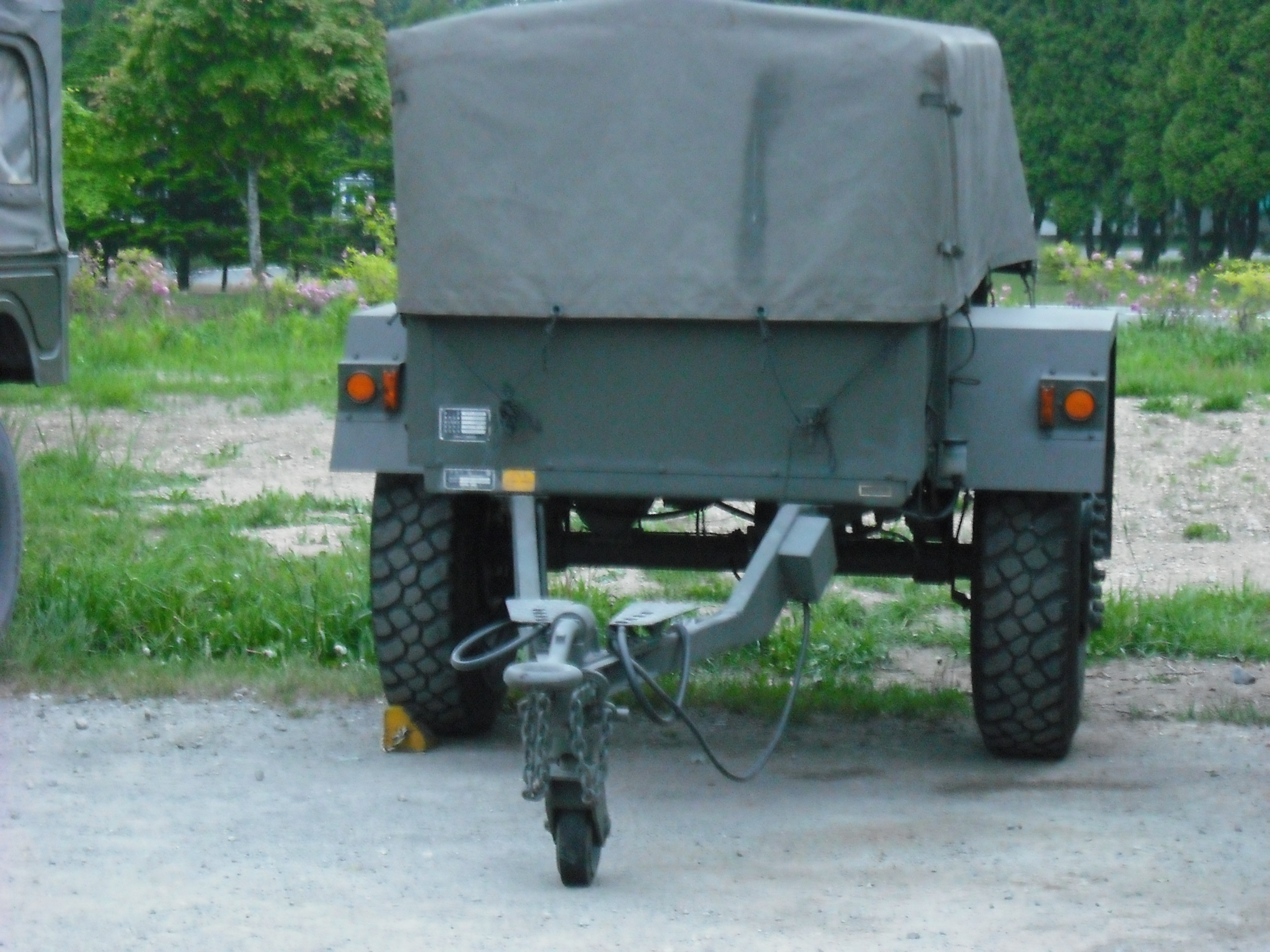 高機動車専用型の改良型、73式大型トラックのタイヤを装着可能に改良されている。